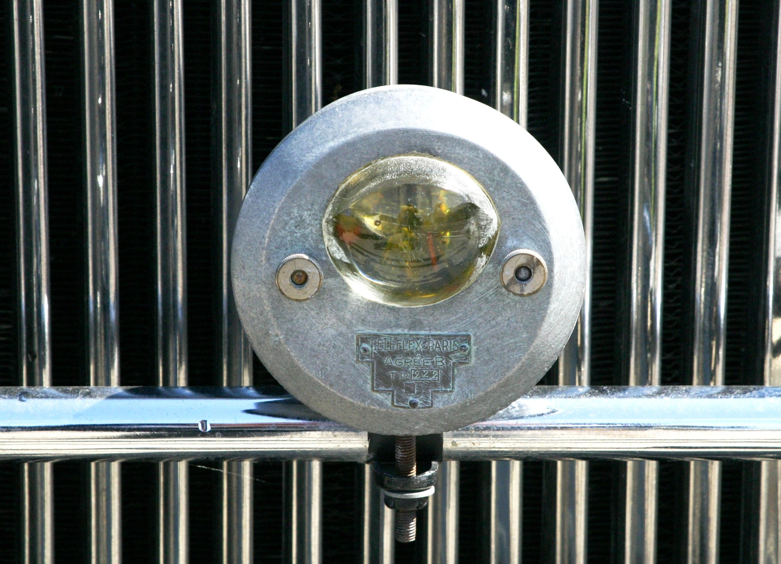 En Niwwelphare vun der Firma TELEFLEX vu Paräis montéiert op engem Citroën vun 1934. Kategorie:Autosgeliits